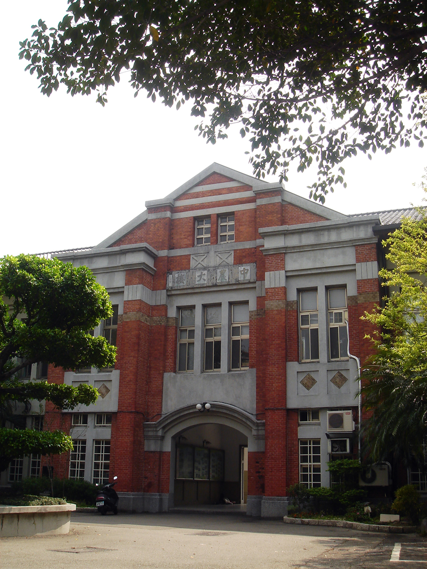 中文（台灣）: 台中高農中農大樓